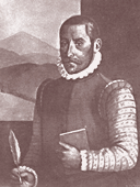 Esteban Garibai, 1533 - 1600